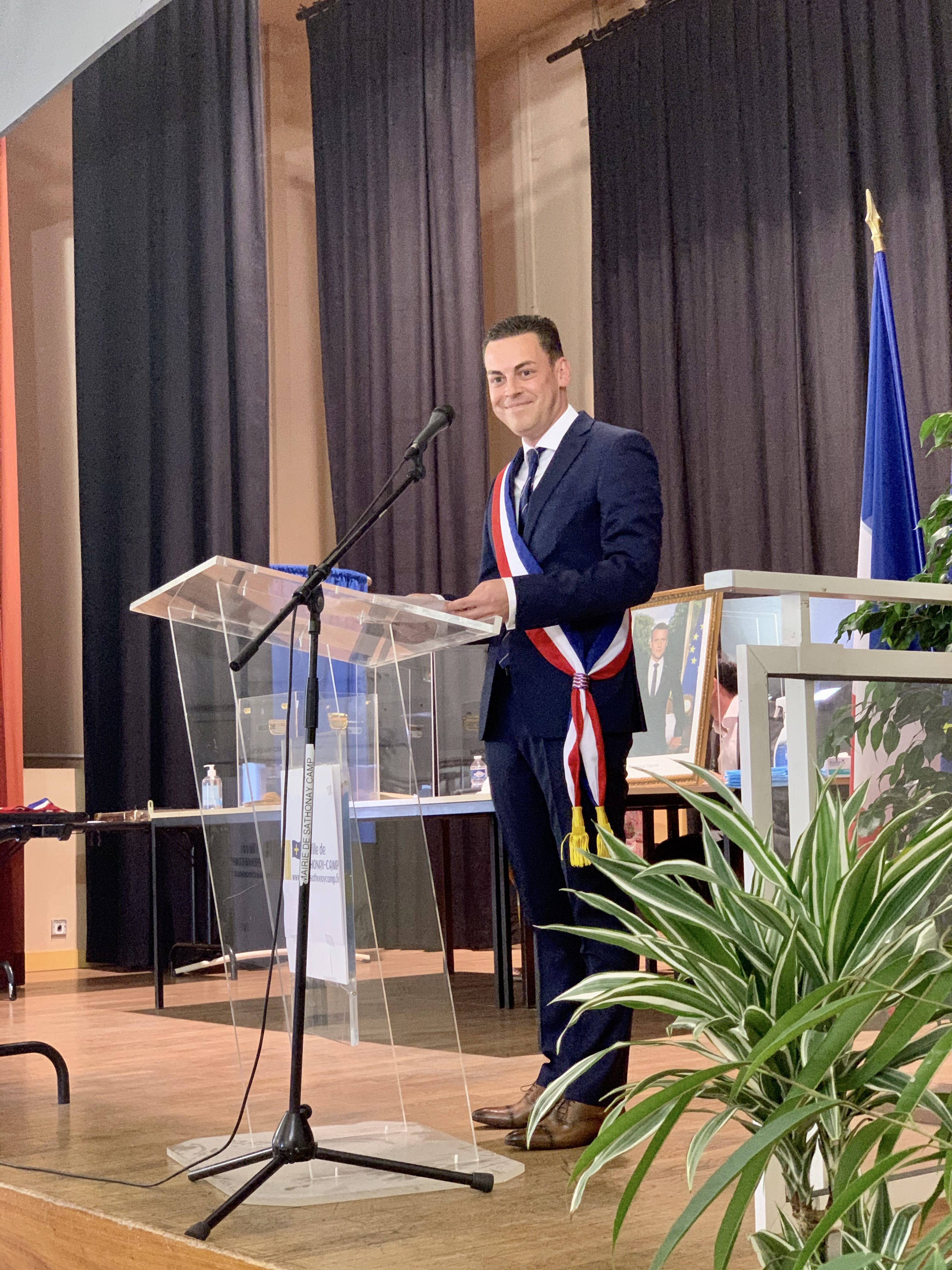 Discours Damien Monnier